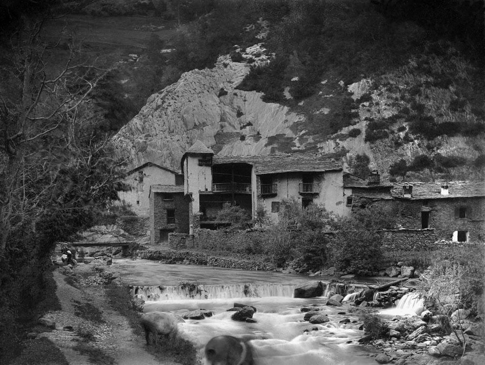 Imatge